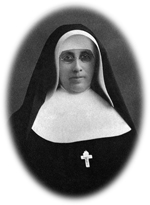 D'Catherine Moes als Nonn.